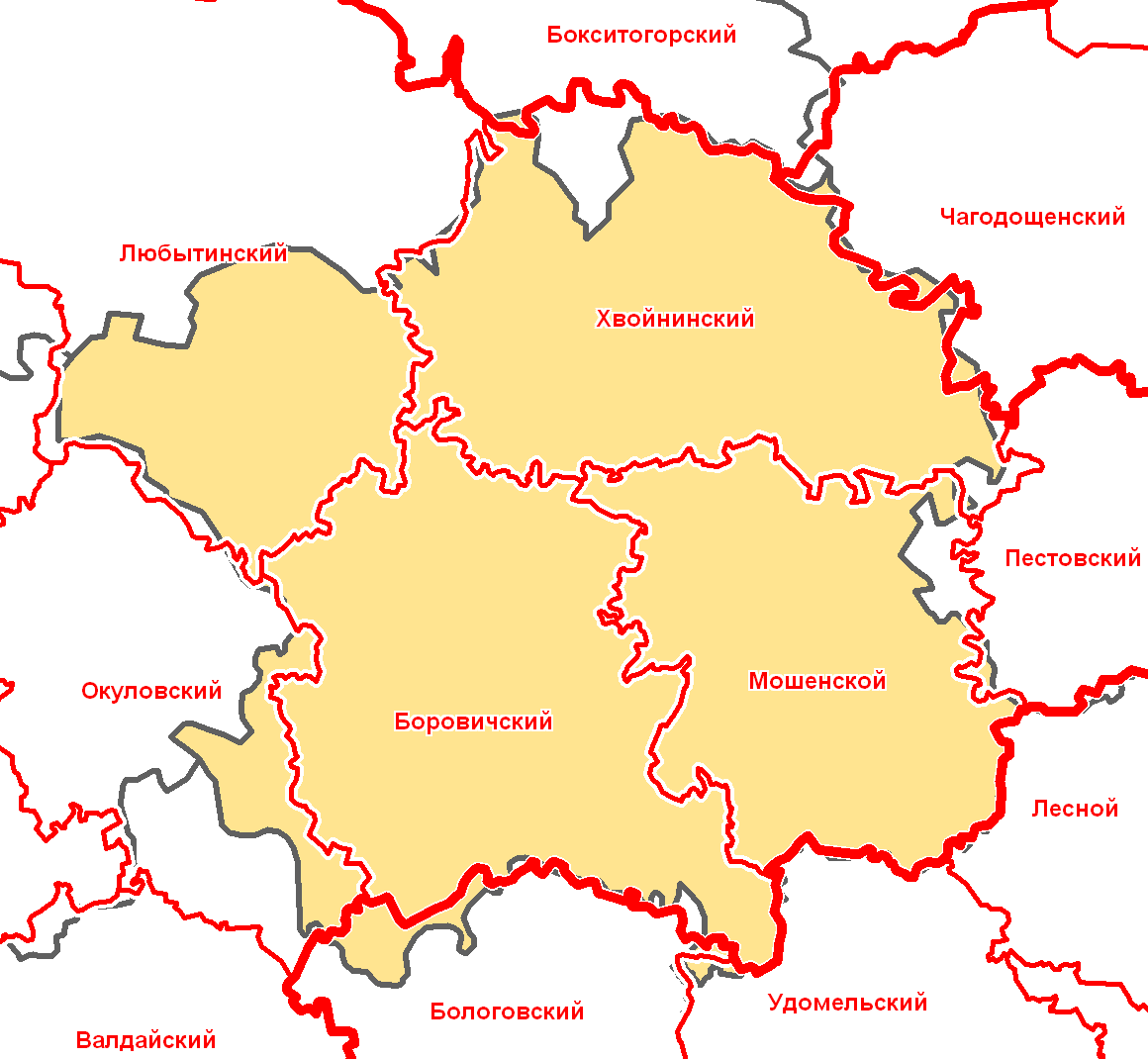 Боровичский уезд Новгородской губернии в современной сетке районов